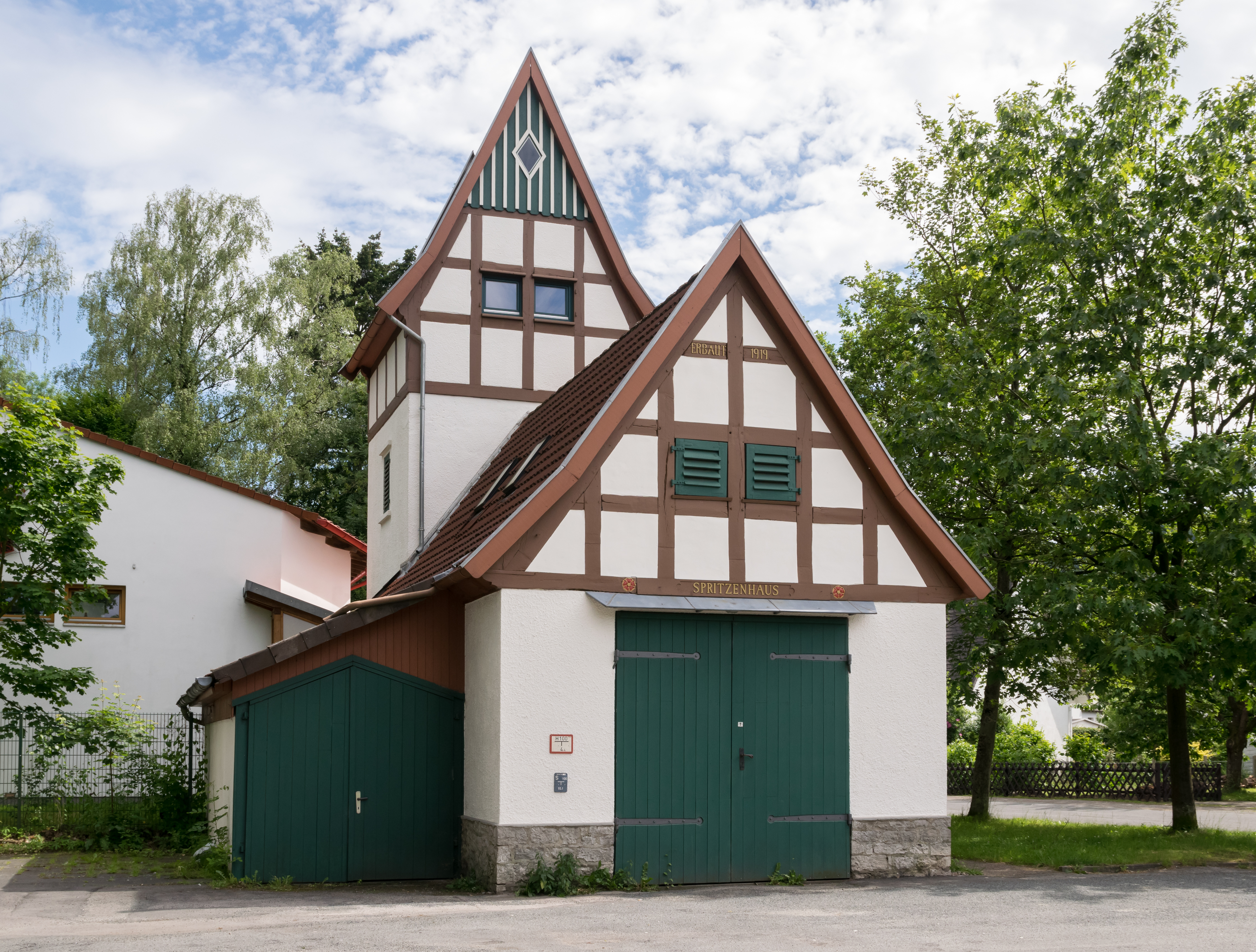 historisches Feuerwehrgerätehaus (Spritzenhaus und Schlauchturm) in Detmold-Hiddesen